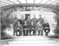 قادة الجيش العراقي Licensing الصورة منسوخة منقبل د. جلال النعيمي ويضعها تحت تصرف الموسوعة.